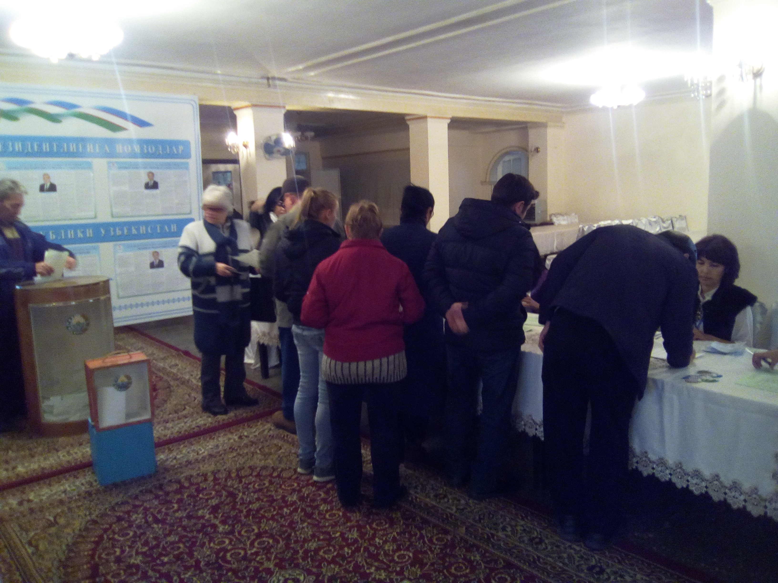 Регистрация избирателей на 403 участке (г. Ташкент) на президентских выборах в Узбекистане 2016 года